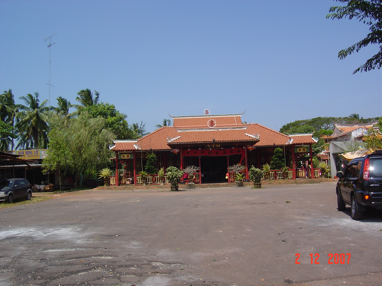 中文（新加坡）: 描述=南亭寺 日期=1/12/2007 作者=林添宝